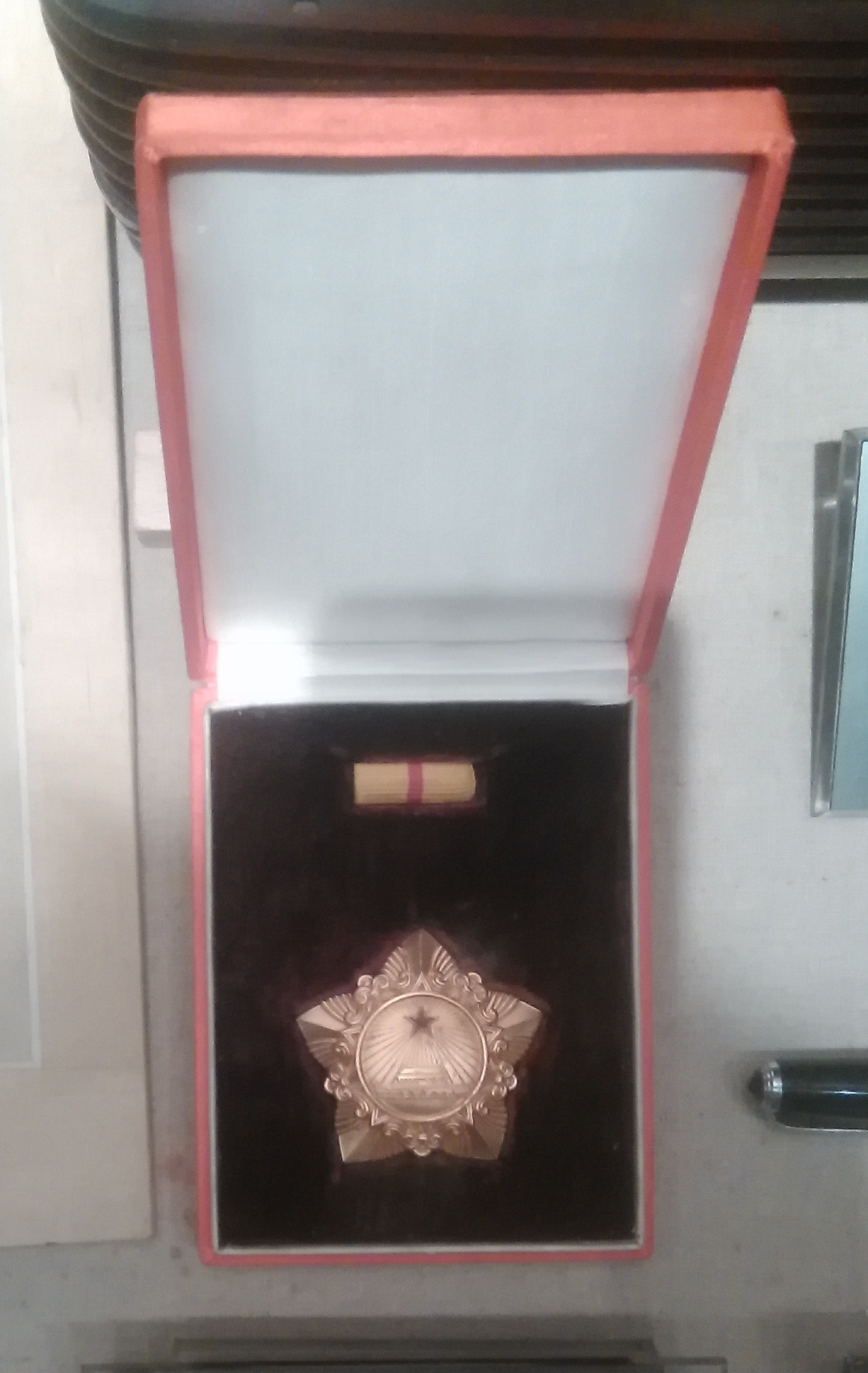 1955年中华人民共和国授予何基沣的一级解放勋章